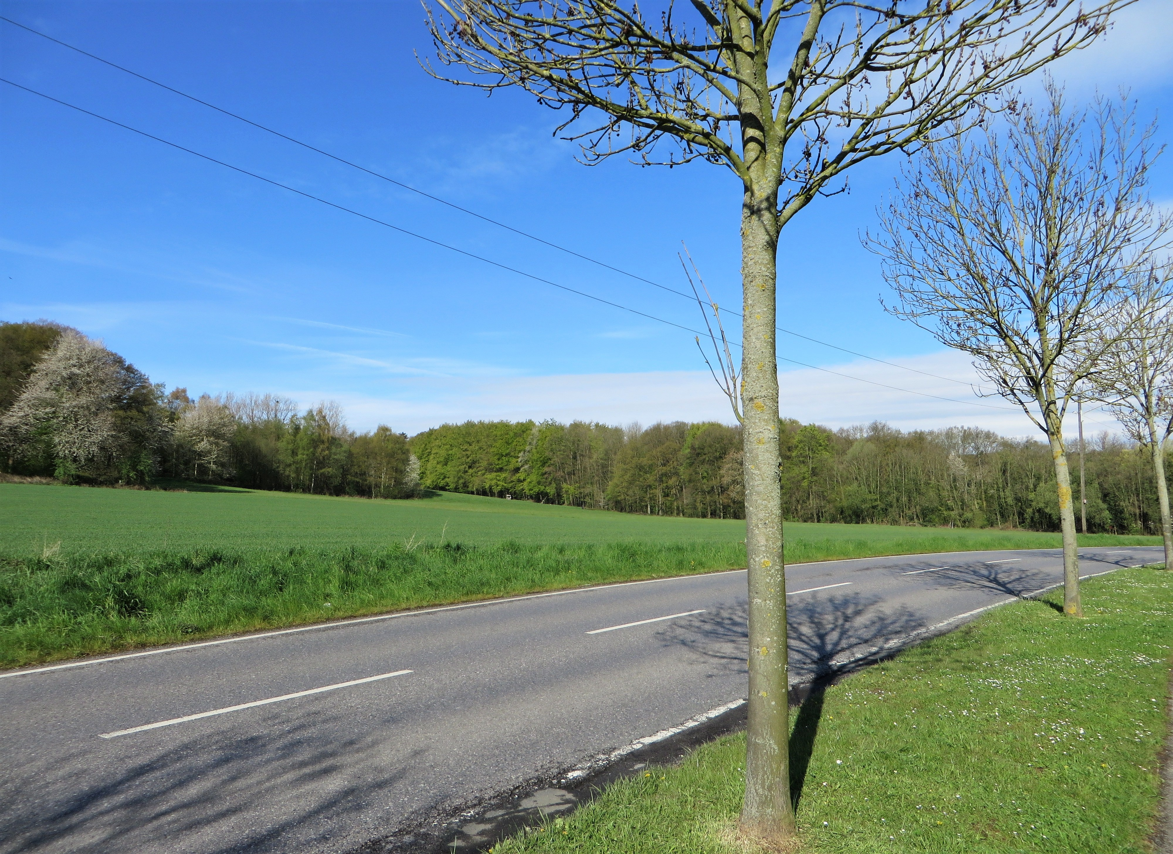 Landschaftsschutzgebiet „Fleyer Wald“ in Hagen-Fley, zwischen Hoheleye, Feithstraße, Halden und Sauerlandstraße. Es handelt sich um ein Mischwaldgebiet mit reichem Unterholz und einigen eingelagerten landwirtschaftlichen Nutzflächen. In diesem Bereich befinden sich tief eingeschnittene Bachtäler, Quellmulden, Tümpel und Stauteiche (Foto: Bereich „Auf dem Dreische“).